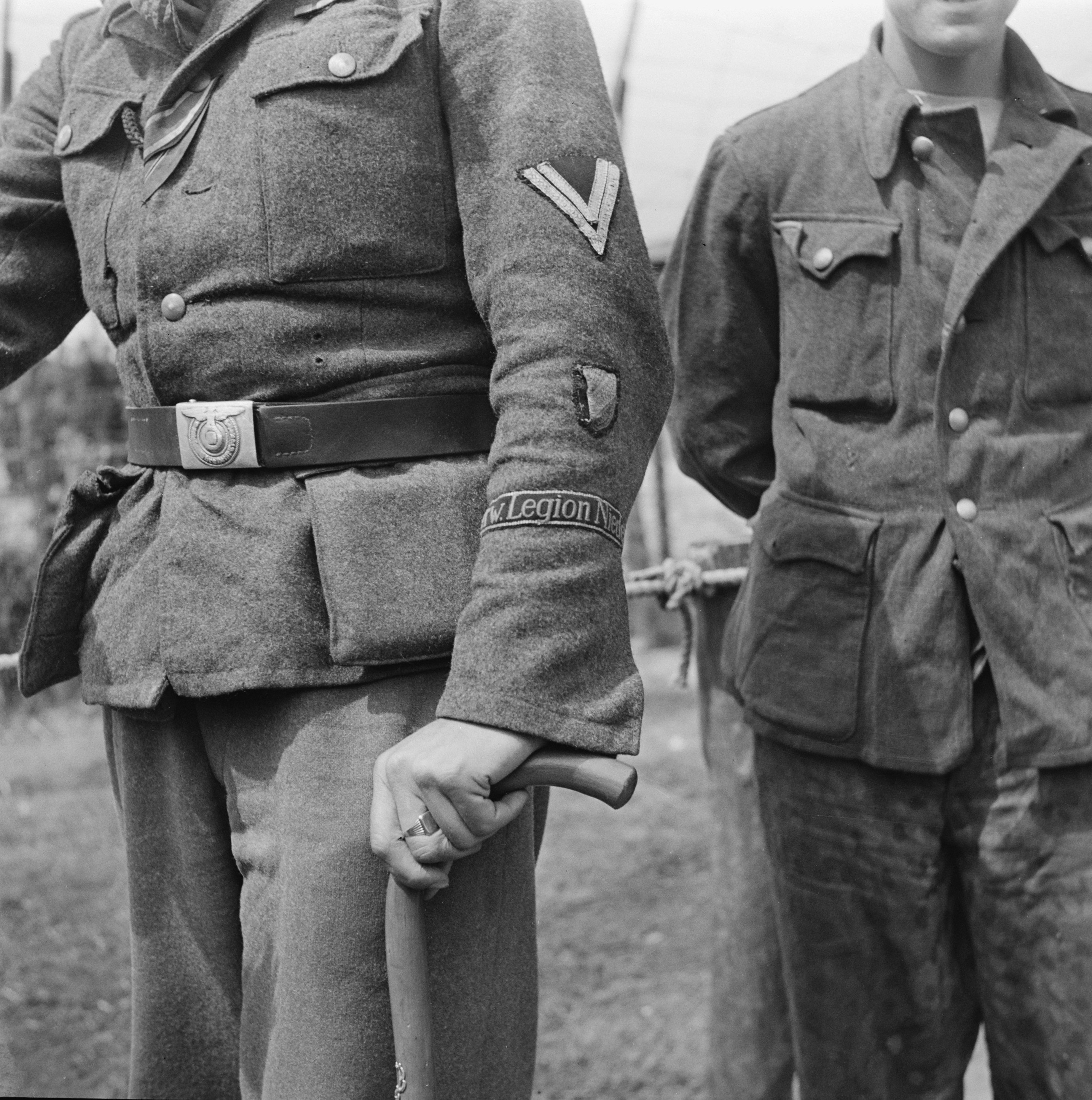 Collectie / Archief : Fotocollectie Anefo Reportage / Serie : Capitulatie: Harskamp [kamp waar SS-ers en Landwachters zijn geinterneerd] Beschrijving : Man in het uniform van het Freiwilligen Legion Niederlande Annotatie : In dit kamp werden ongeveer 4000 Nederlandse SS-gevangenen ondergebracht (waaronder Landmacht, Landstorm, Viking, Germania, Holl. Grüne Polizei etc.) hun berechting afwachtten Datum : juni 1945 Locatie : Gelderland, Harskamp Trefwoorden : interneringskampen, krijgsgevangenen, militairen Fotograaf : Poll, Willem van de / Anefo Auteursrechthebbende : Nationaal Archief Materiaalsoort : Negatief (zwart/wit) Nummer archiefinventaris : bekijk toegang 2.24.01.03 Bestanddeelnummer : 900-3412